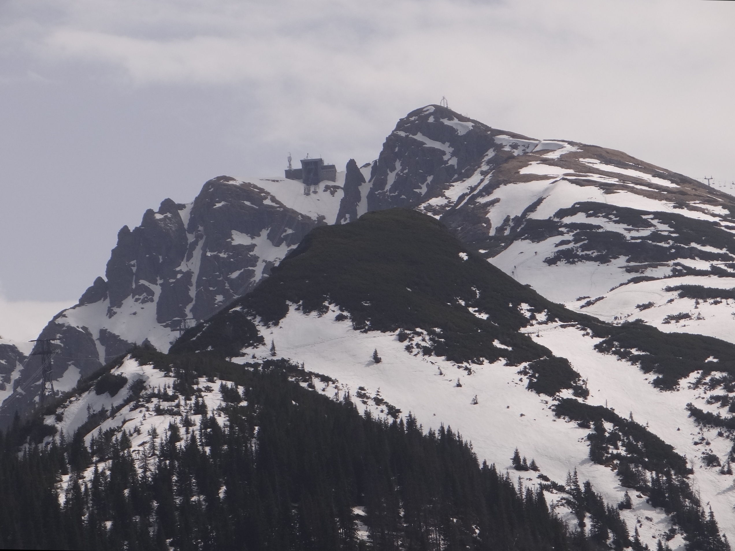 Szczyt Kasprowego Wierchu, widok z kolejki linowej